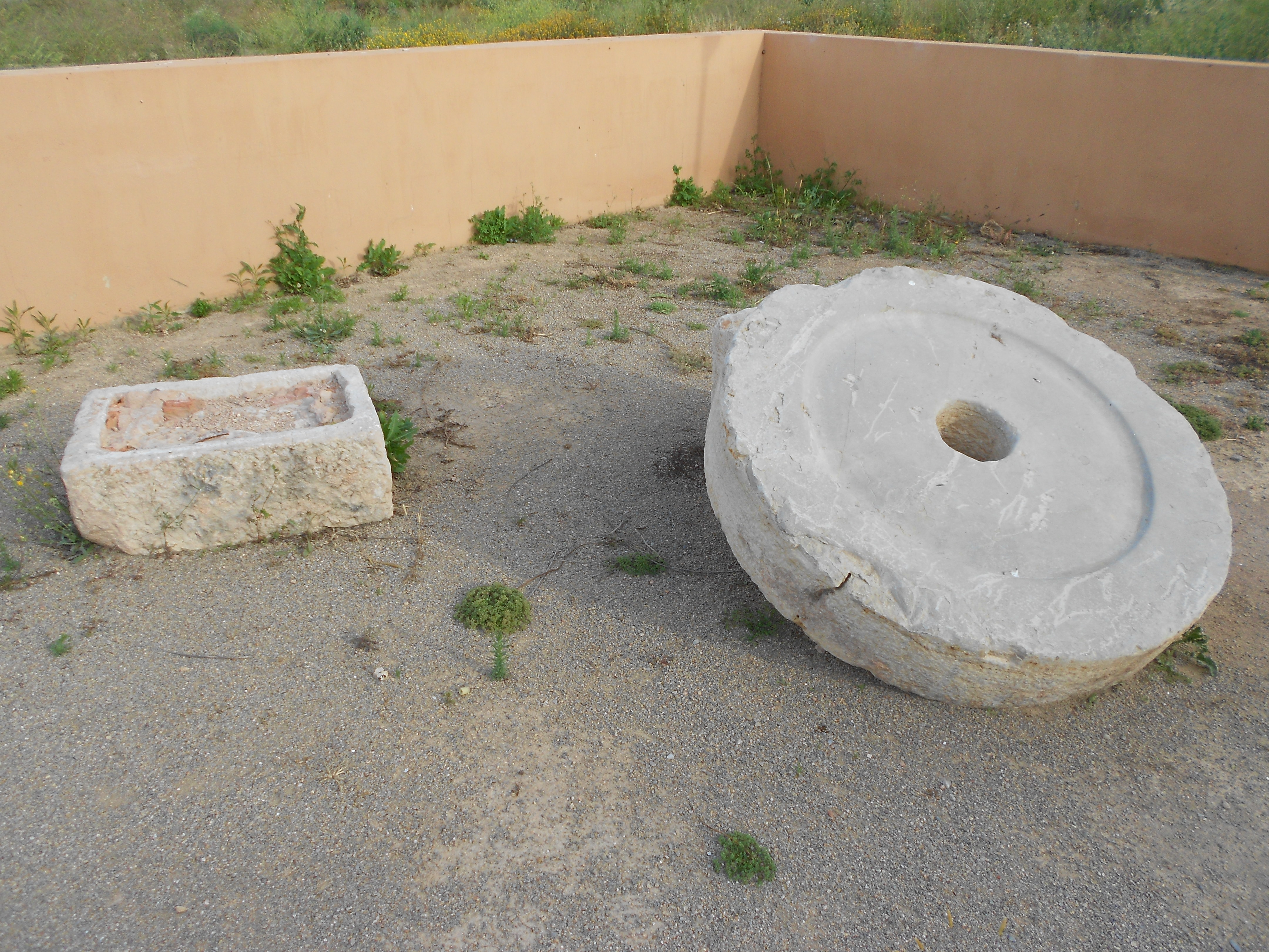 Detall del molí de Baix